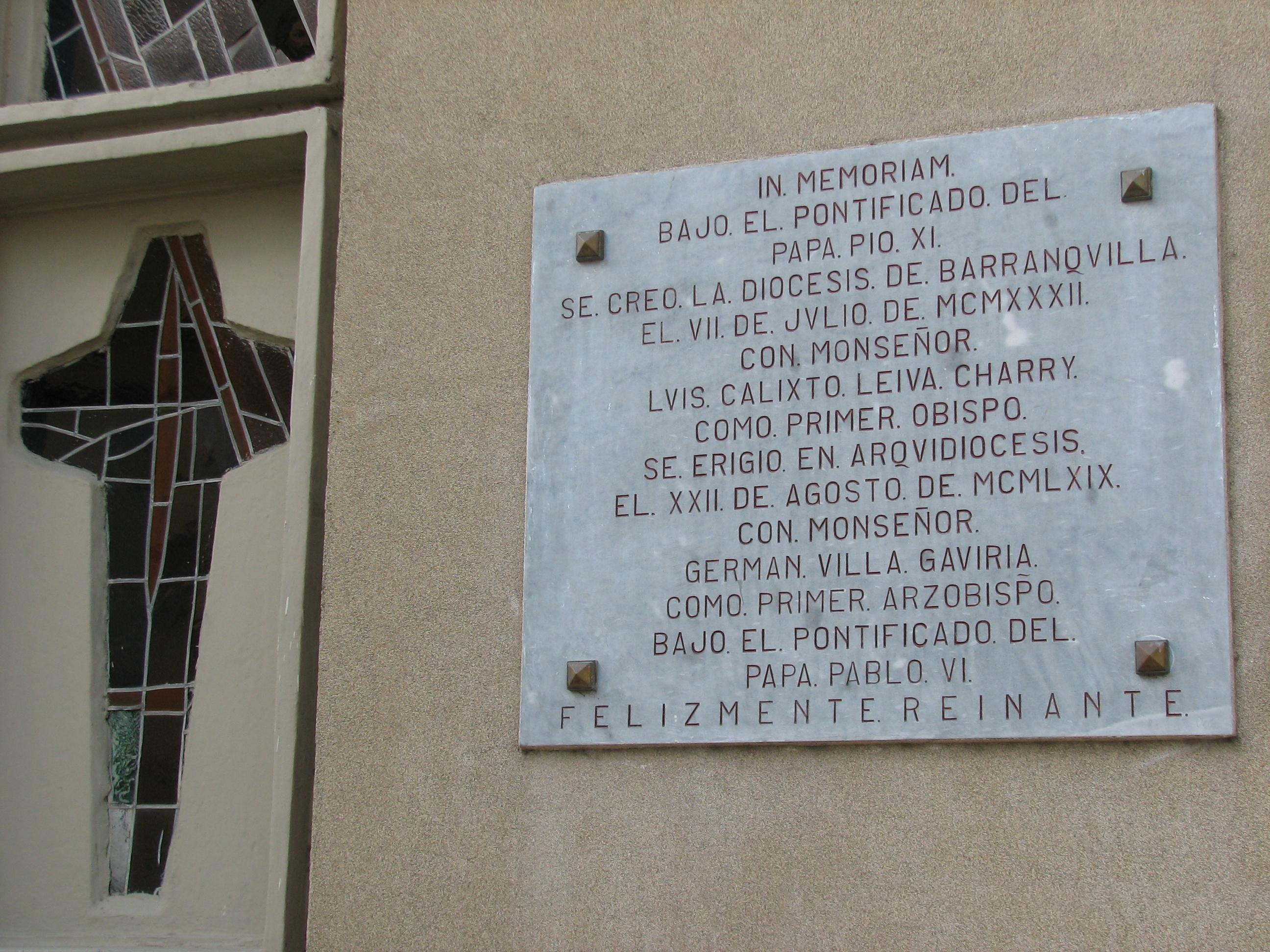 In memoriam Catedral de Barranquilla